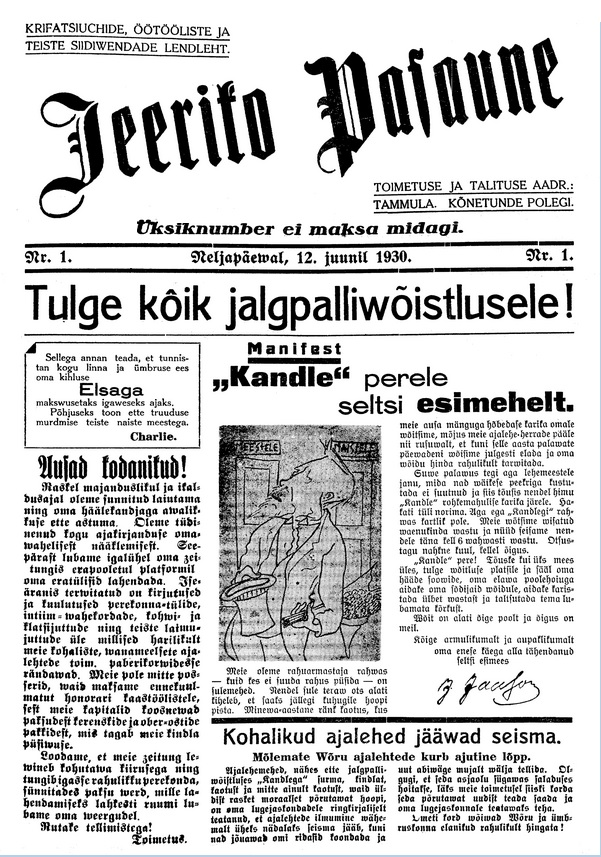 Jeeriko Pasaune, esikaas